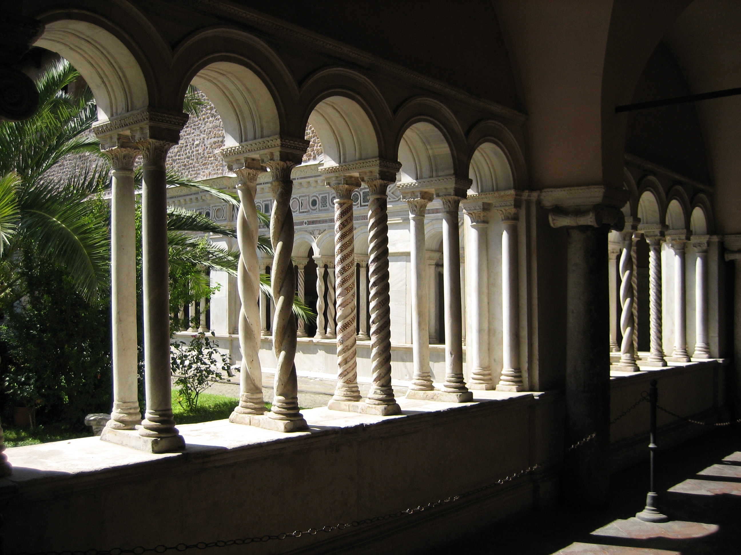 Rom_Lateran_Kreuzgang_05